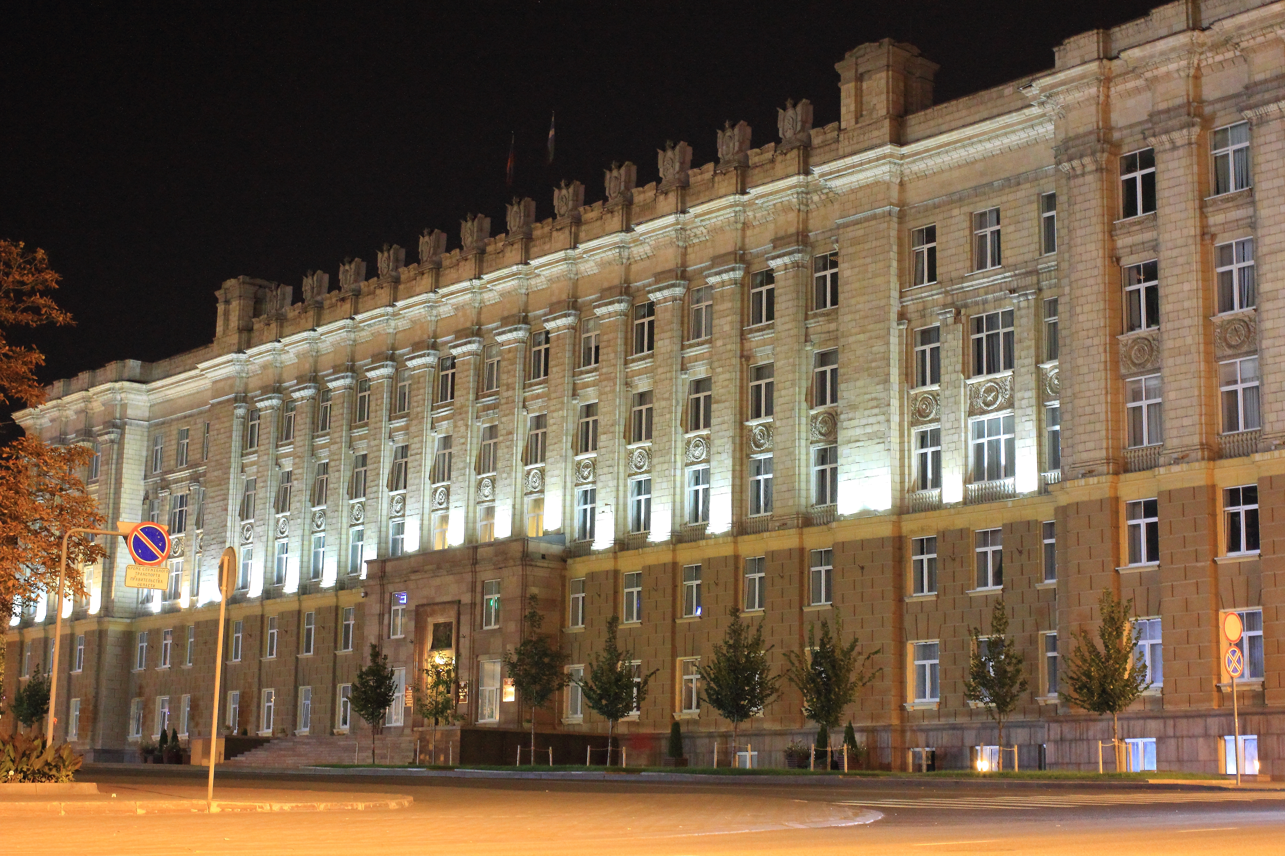 Административное здание (Белгородская область, Белгород, Соборная площадь, 4)